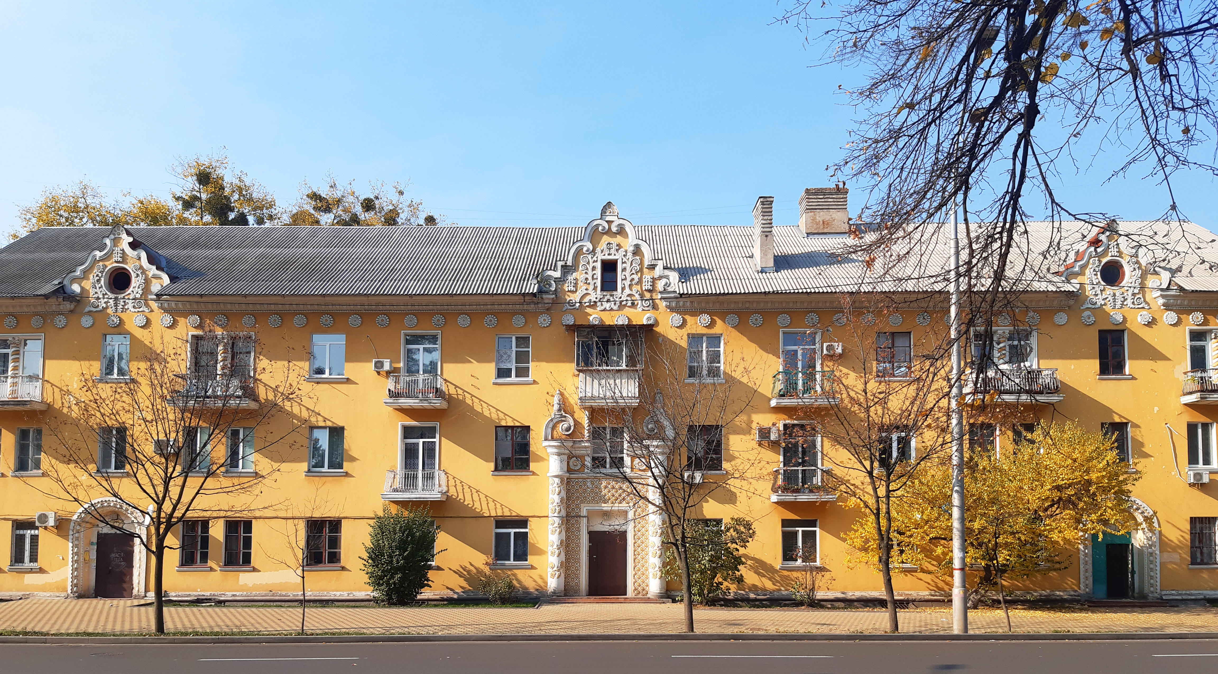 ДВРЗ Алматинська вулиця, 101. Будинок серії 1-302, декорований елементами українського бароко (1950-ті). Проект Анатолія Добровольського.